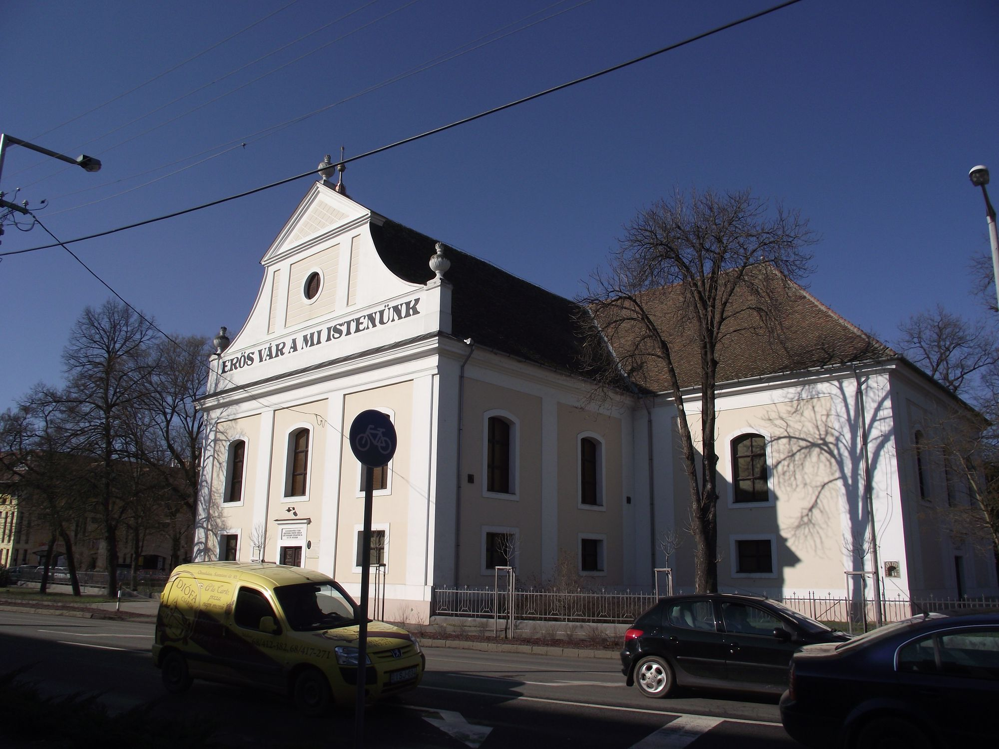 Evangélikus templom, Orosháza